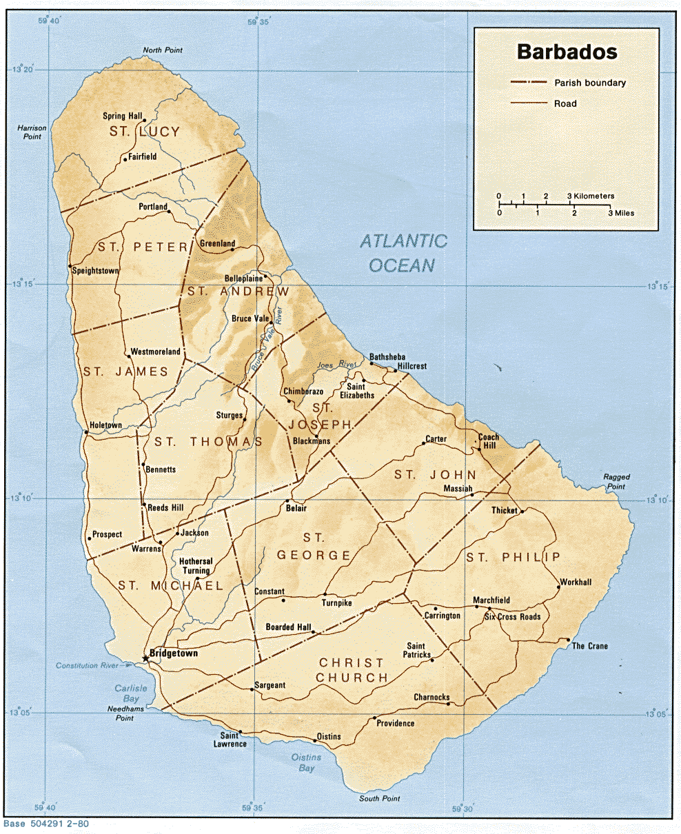 Map of Barbados